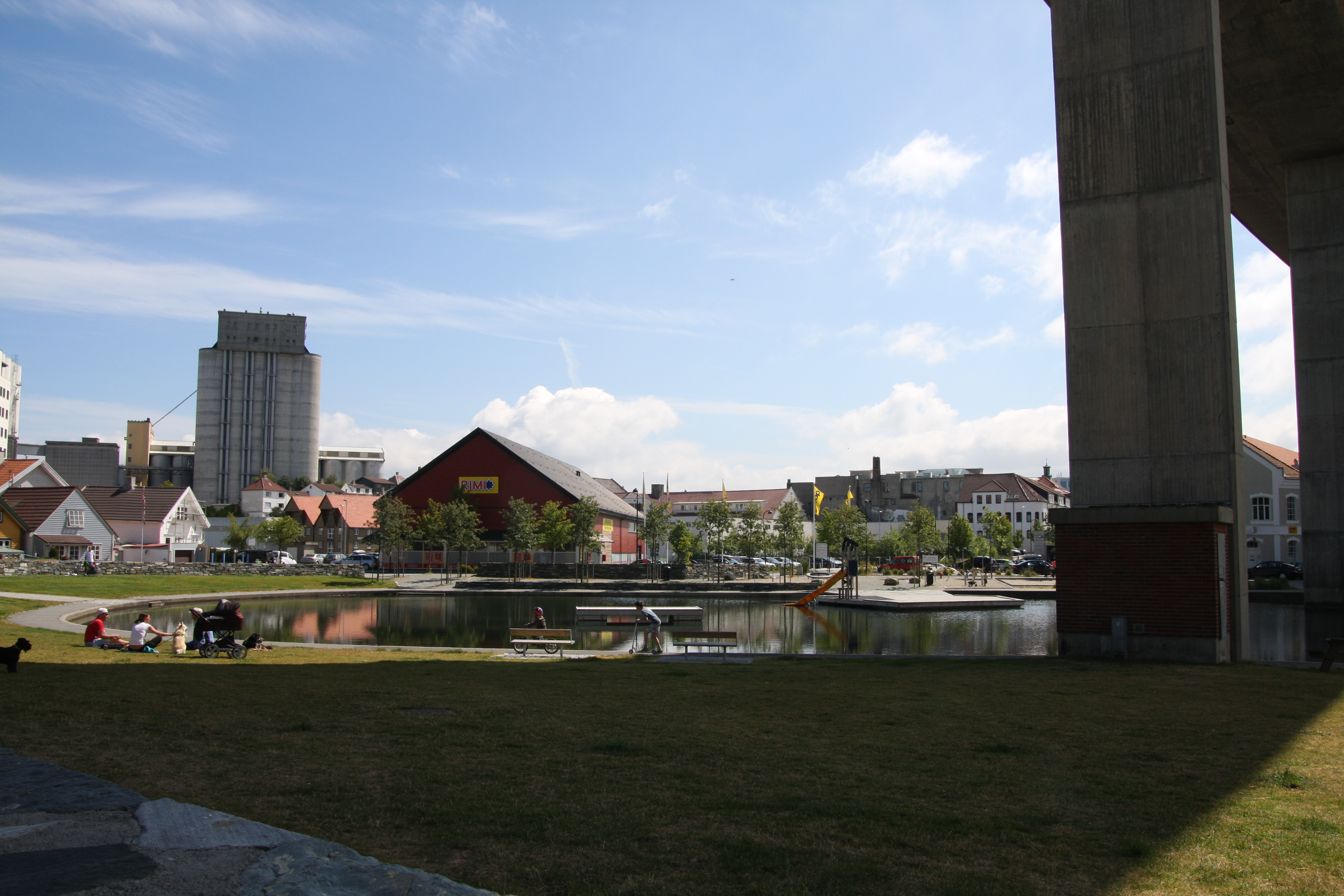 Badedammen, Stavanger